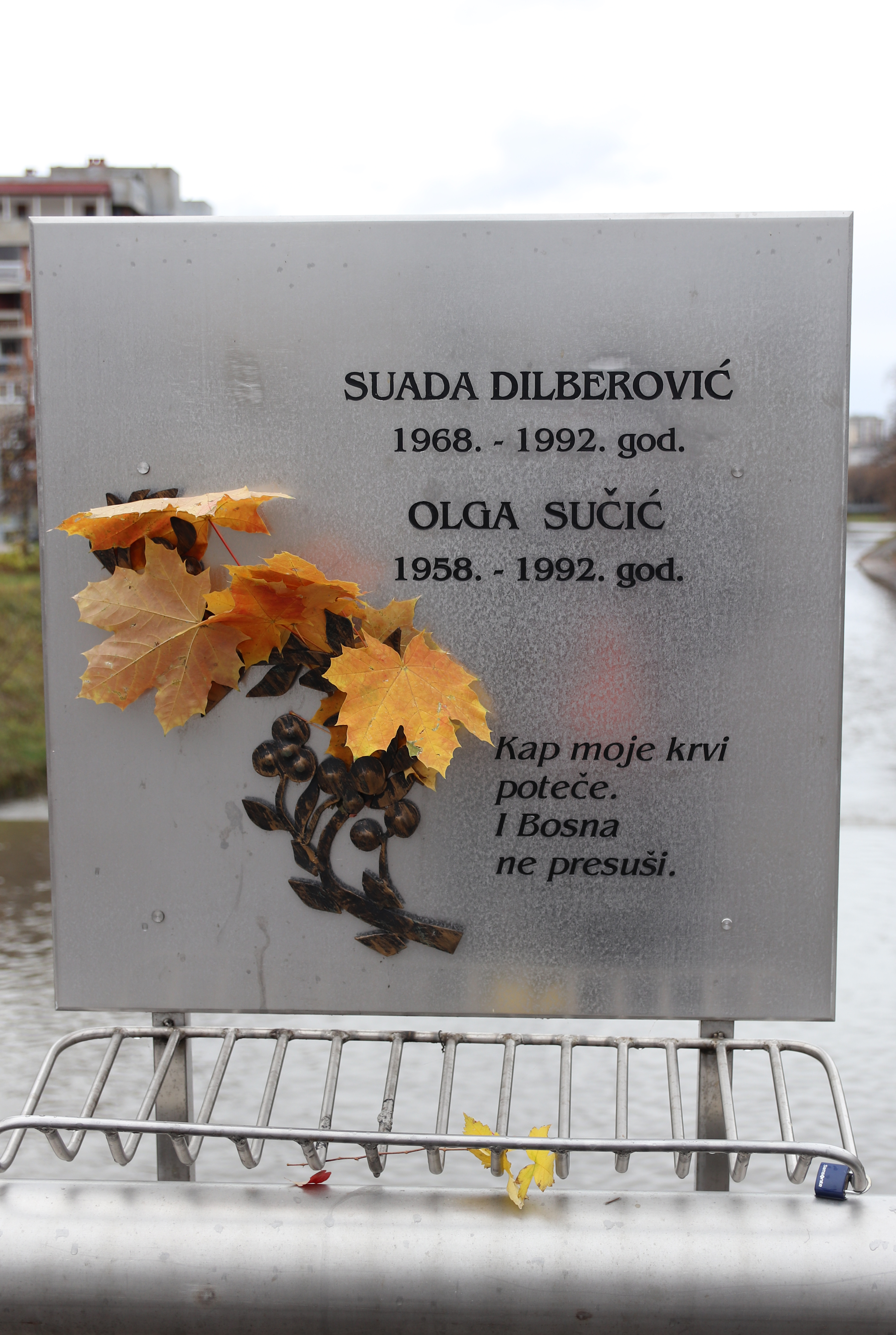 Gedenktafel auf der Most Suade i Olge in Sarajevo für die 23-jährige Suada Dilberović und die 34-jährige Olga Sučić, die am frühen Nachmittag des 5. April 1992 0auf der Brücke durch den Beschuss von Heckenschützen starben.